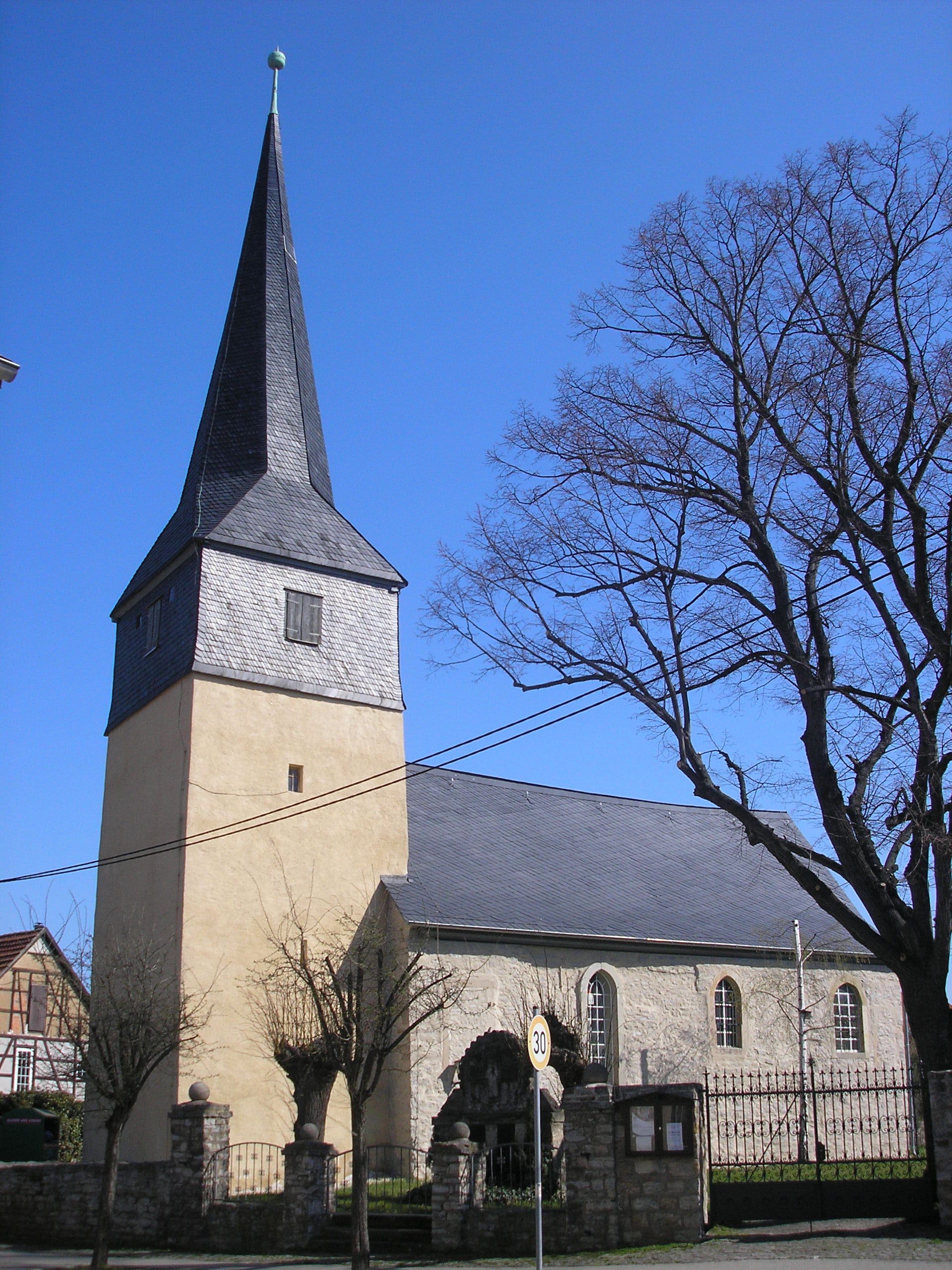 Die Kirche in Linderbach bei Erfurt.